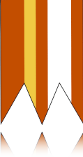 Vlajka obce Prievaly